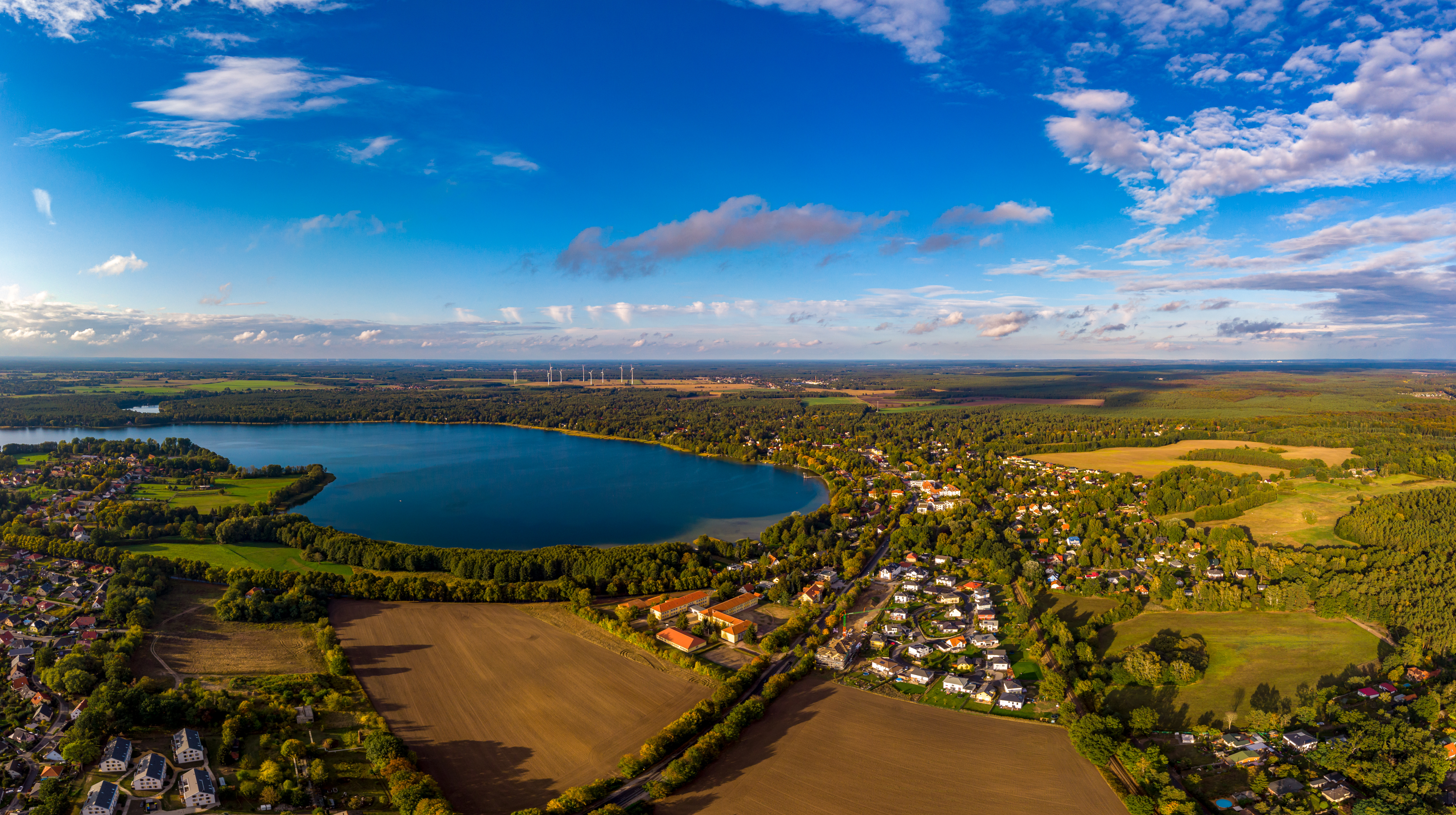 Wandlitz